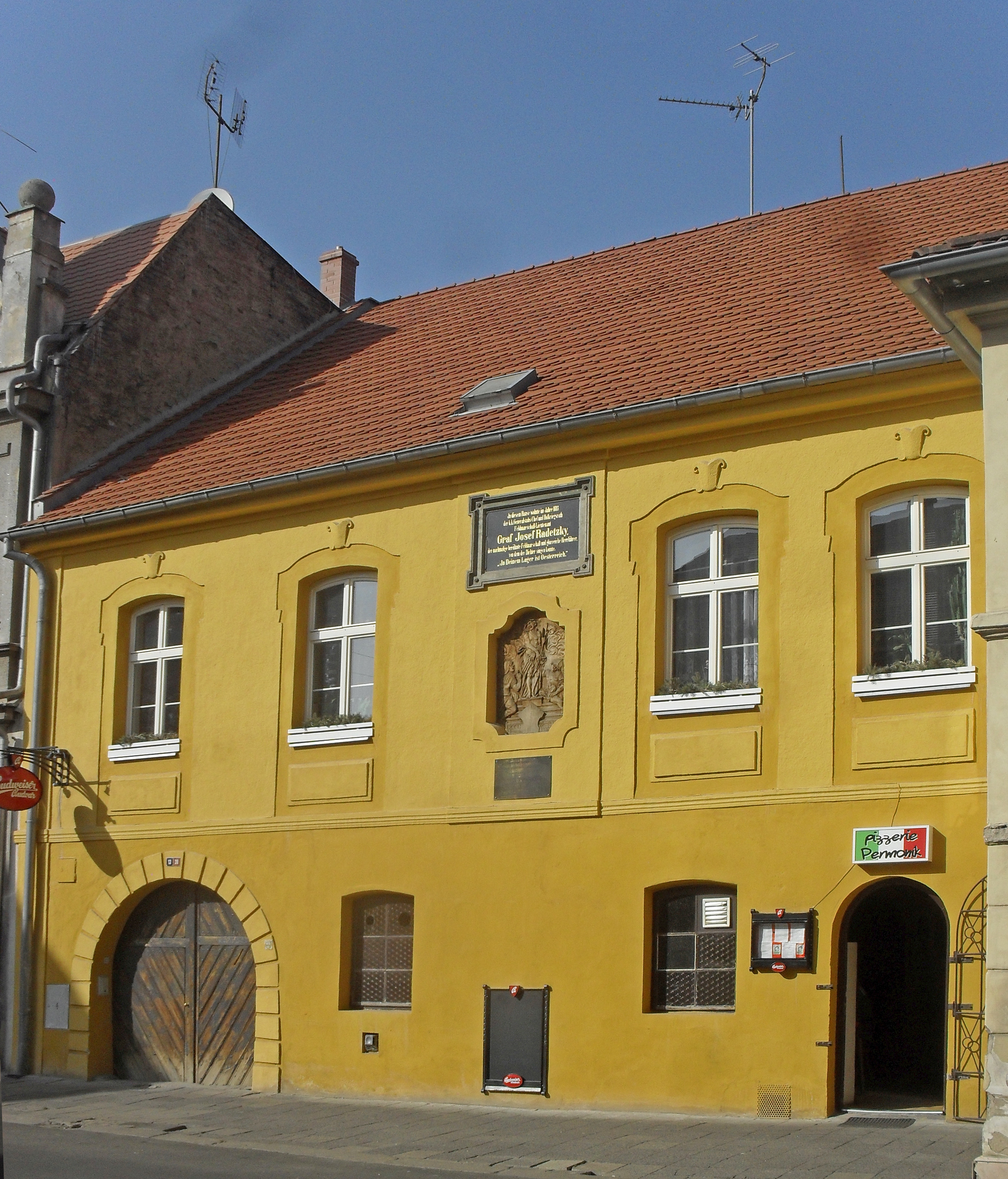 Husova 38/13, Duchcov. V tomto domě pobýval v roce 1813 rakouský maršál Radecký.